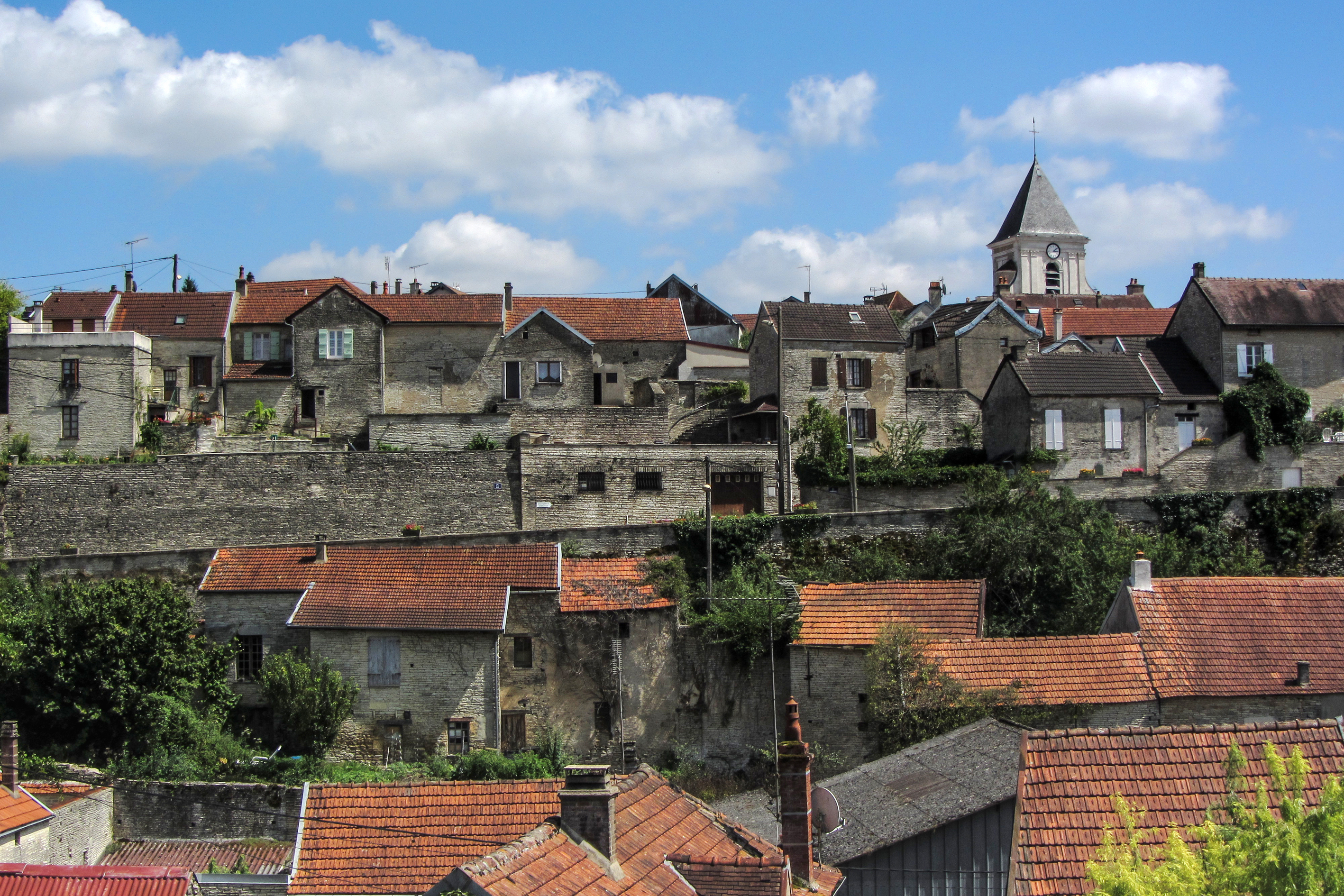 Cruzy-le-Châtel (Yonne)